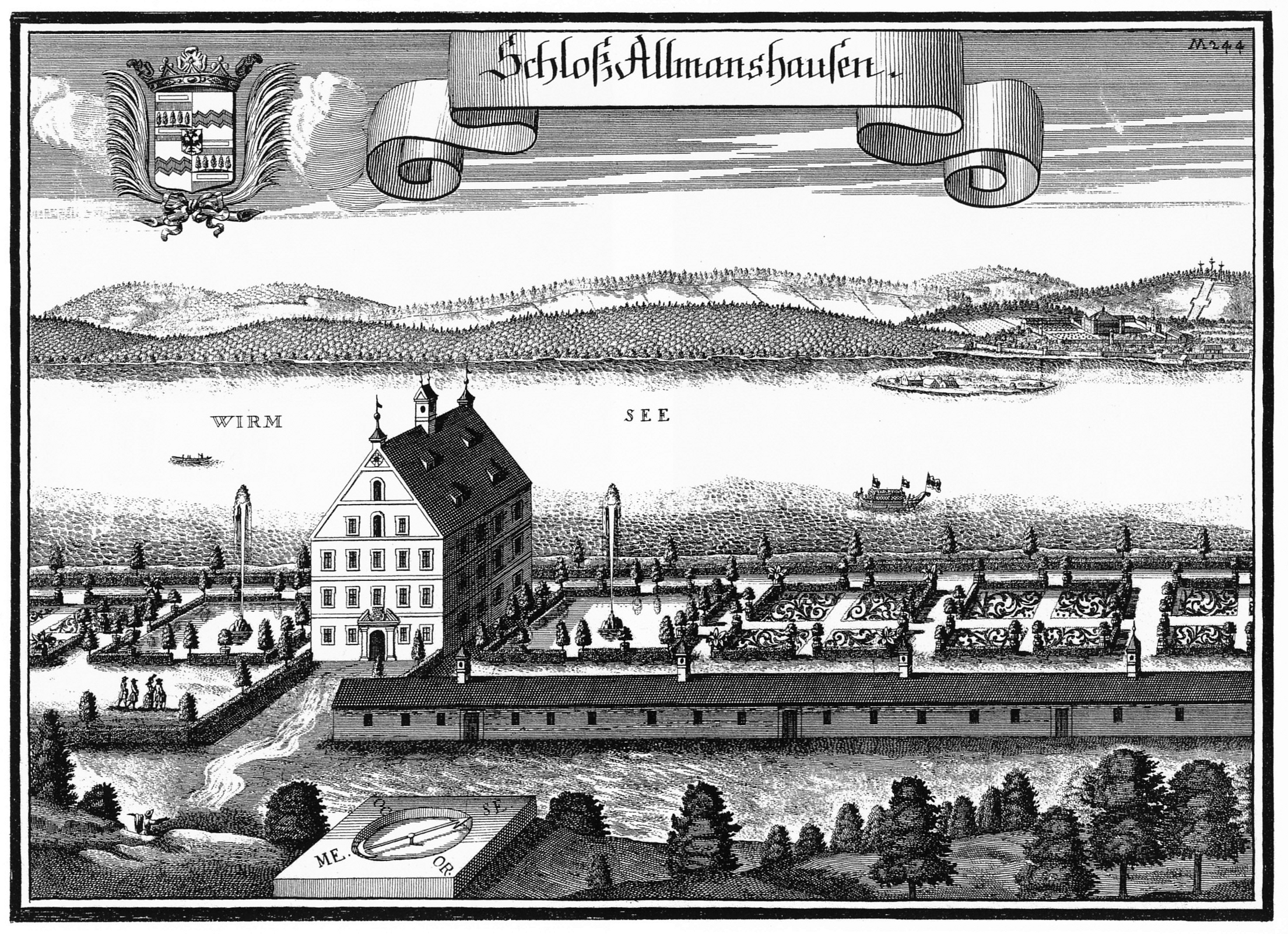 Schloss Allmannshausen, Kupferstich von Michael Wening um 1700.